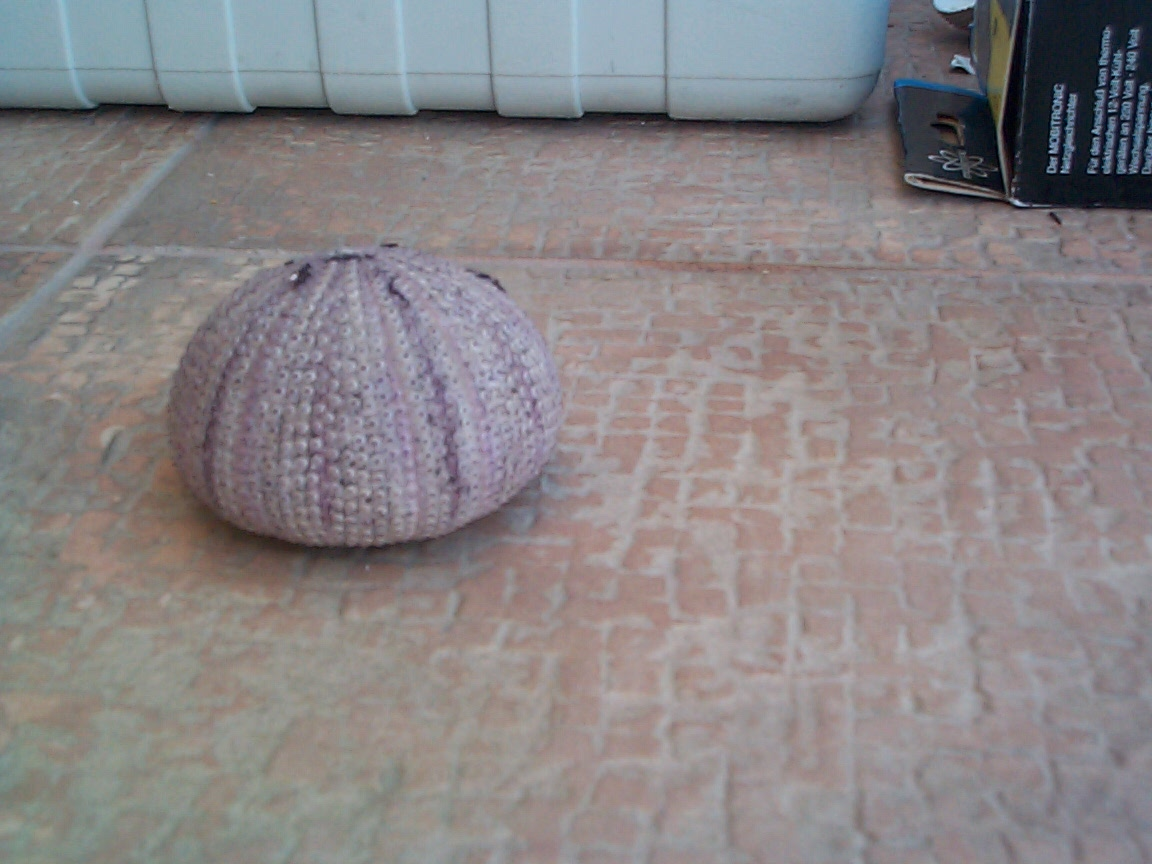 Tengeri sün váza (Slatine, Horvátország)